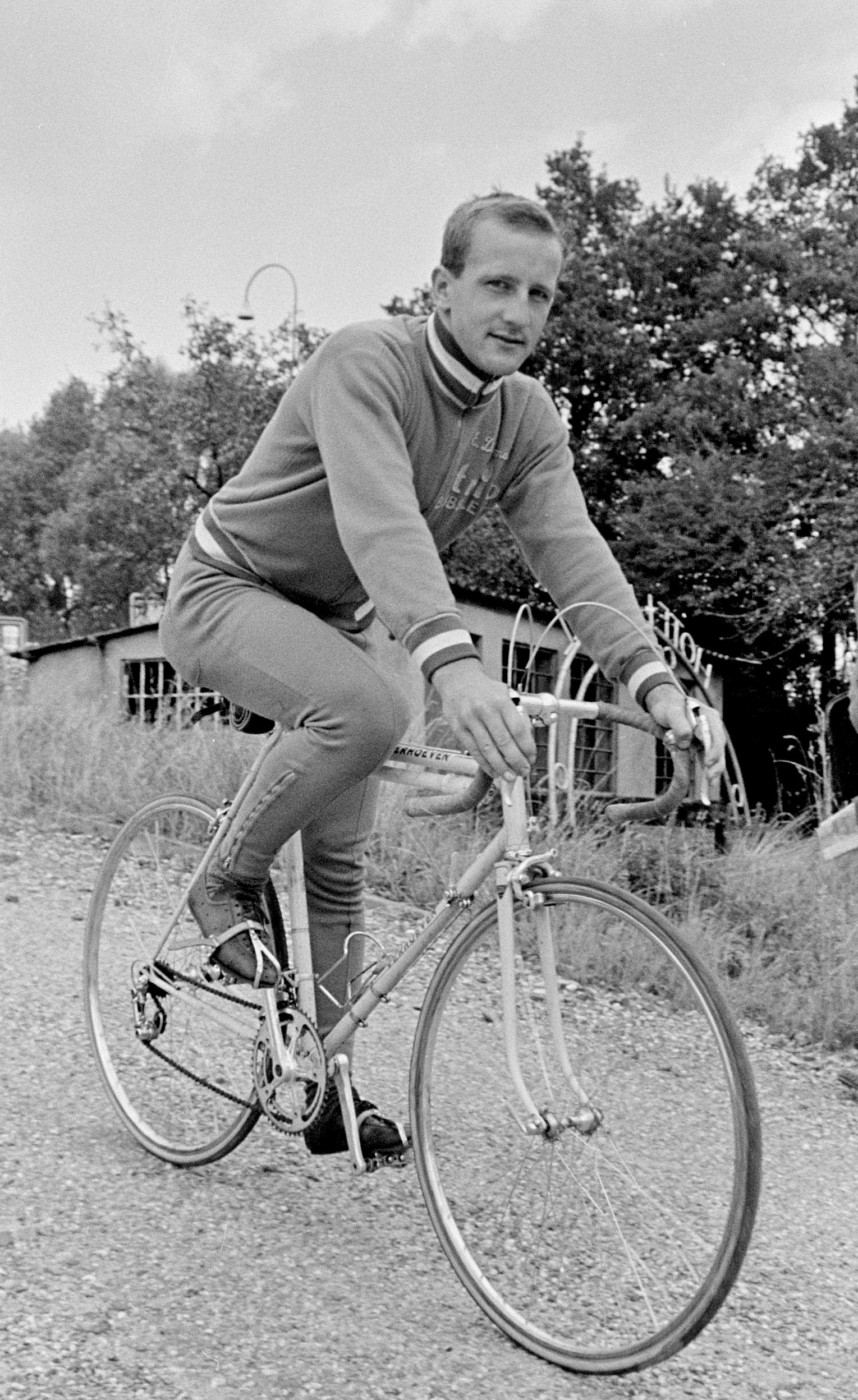 Wielrennen, amateurploeg te Nuth, nummer 21 en 22 Evert Dolman (kop), nummer 19 en 20 op de fiets